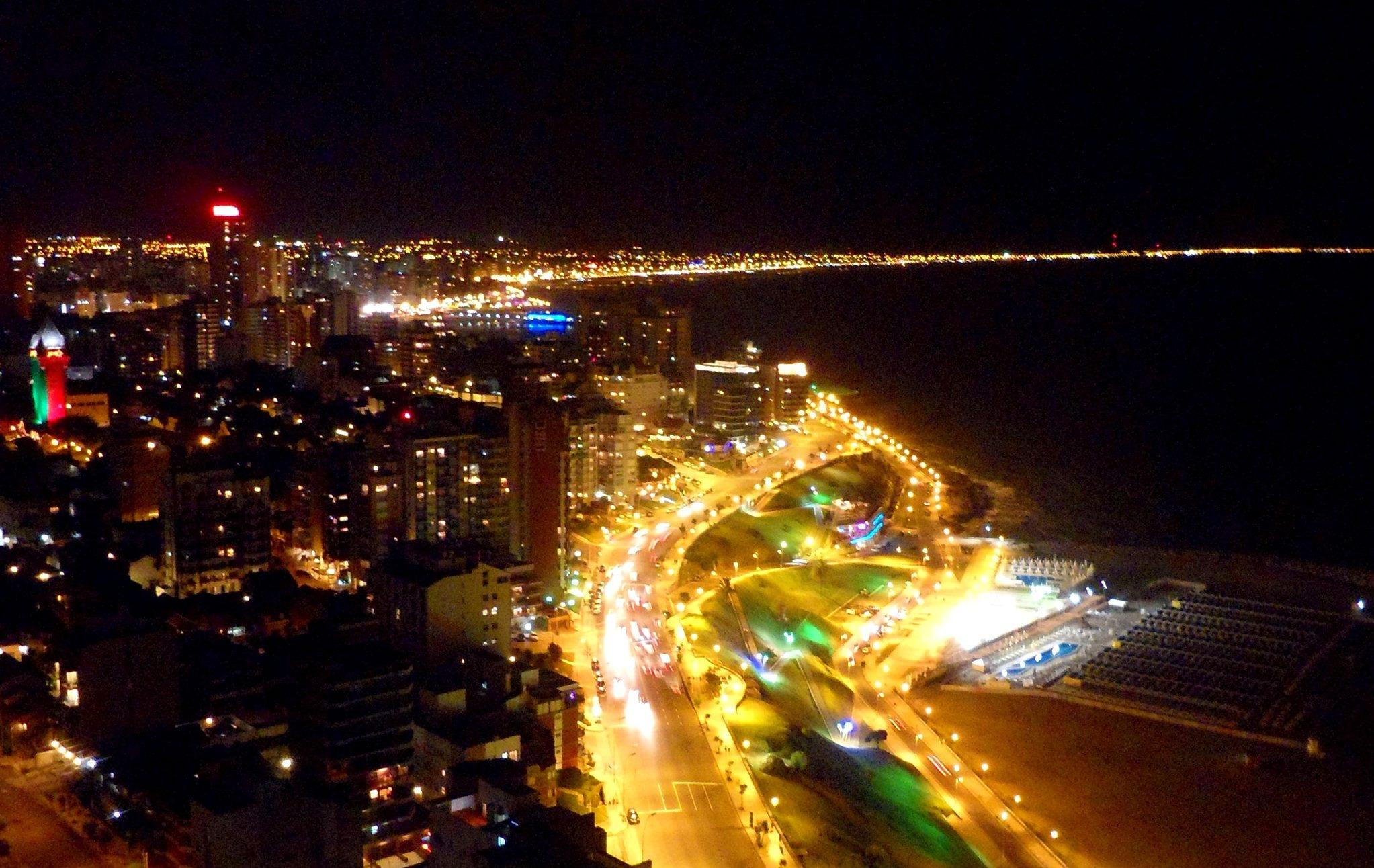 Vista hacia el norte desde el piso 29 de Torres de Manantiales